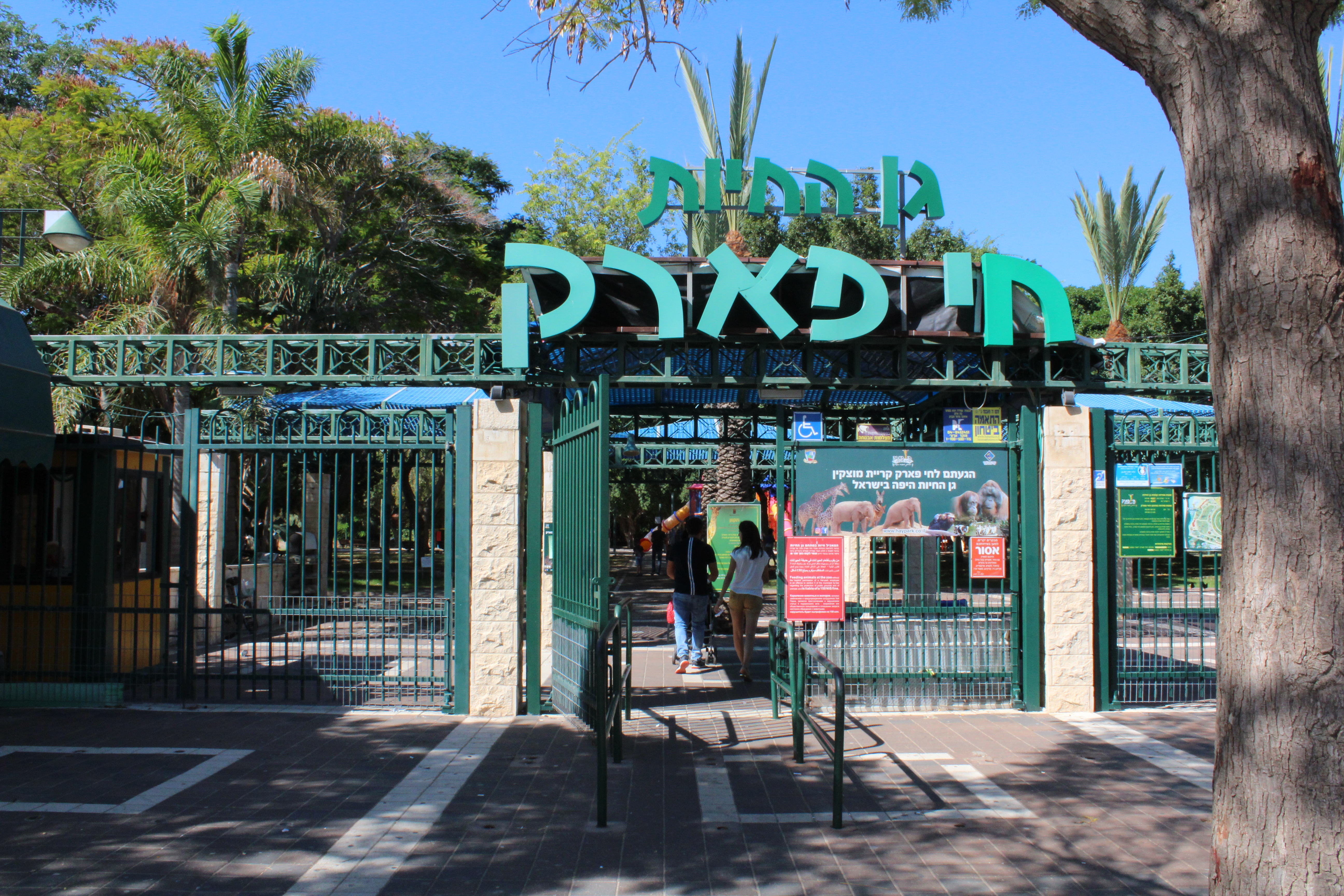 כניסה לחי פארק קריית מוצקין